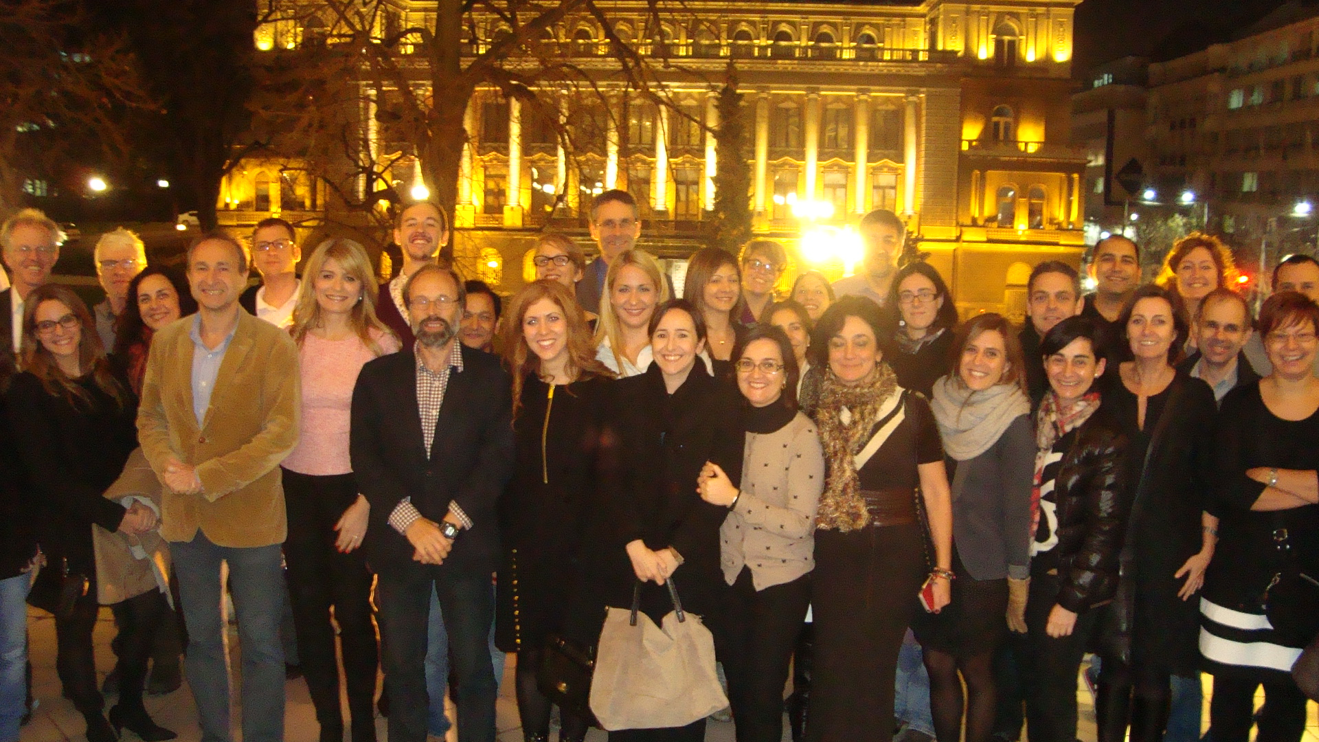 У прилогу Фотографија−EUGEI истраживачи у Београду 17-18.11. 2014. године Слика је власништво Нађе Марић